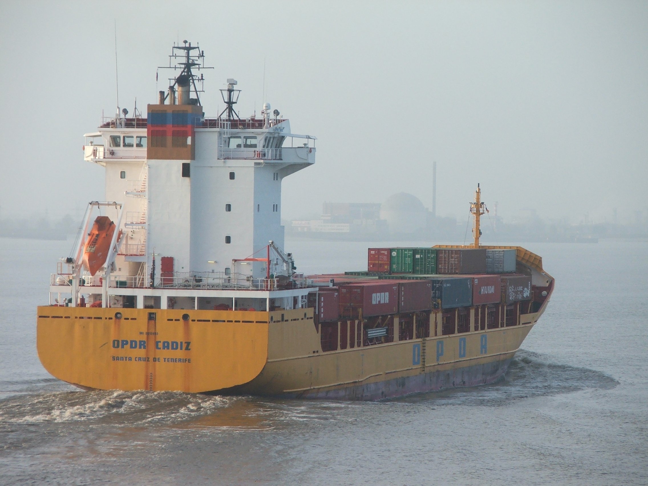 Containerfeederschiff OPDR Cadiz der Hamburger Reederei Oldenburg-Portugiesische Dampfschiffs-Reederei, elbausgehend IMO Number: 9216858 MMSI Number: 224505000 Callsign: EBWM Length: 128 m Beam: 21 m